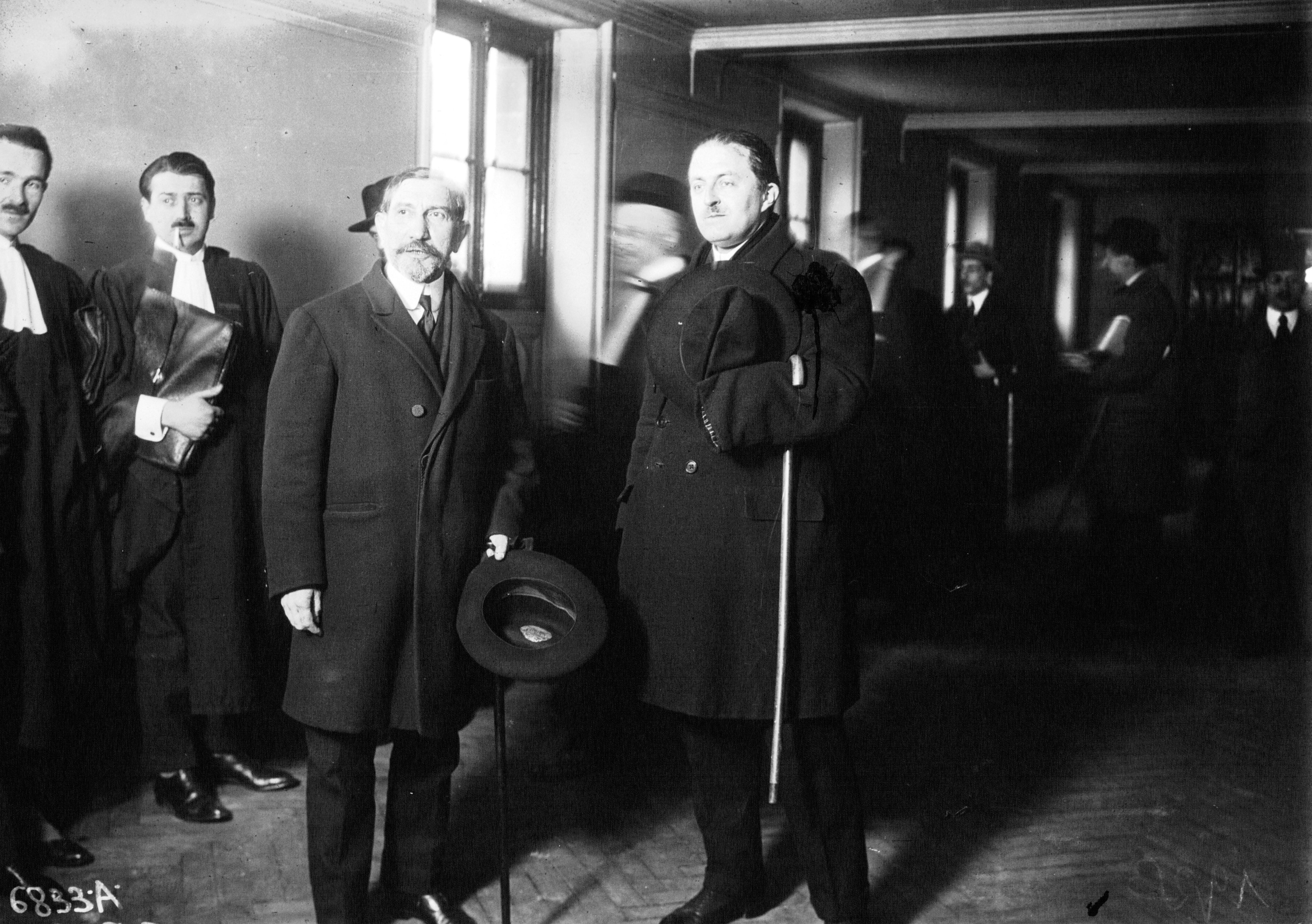 Les Camelots du Roi au Palais : à droite Maxime Réal Del Sarte, gauche : Maurras [photographie de presse]